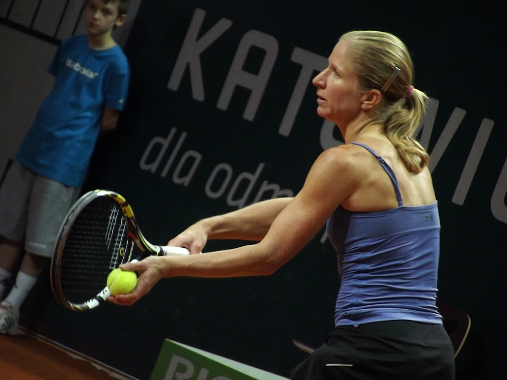 Zdjęcie zrobione podczas kobiecego turnieju tenisowego BNP Paribas Katowice Open, w katowickim Spodku.